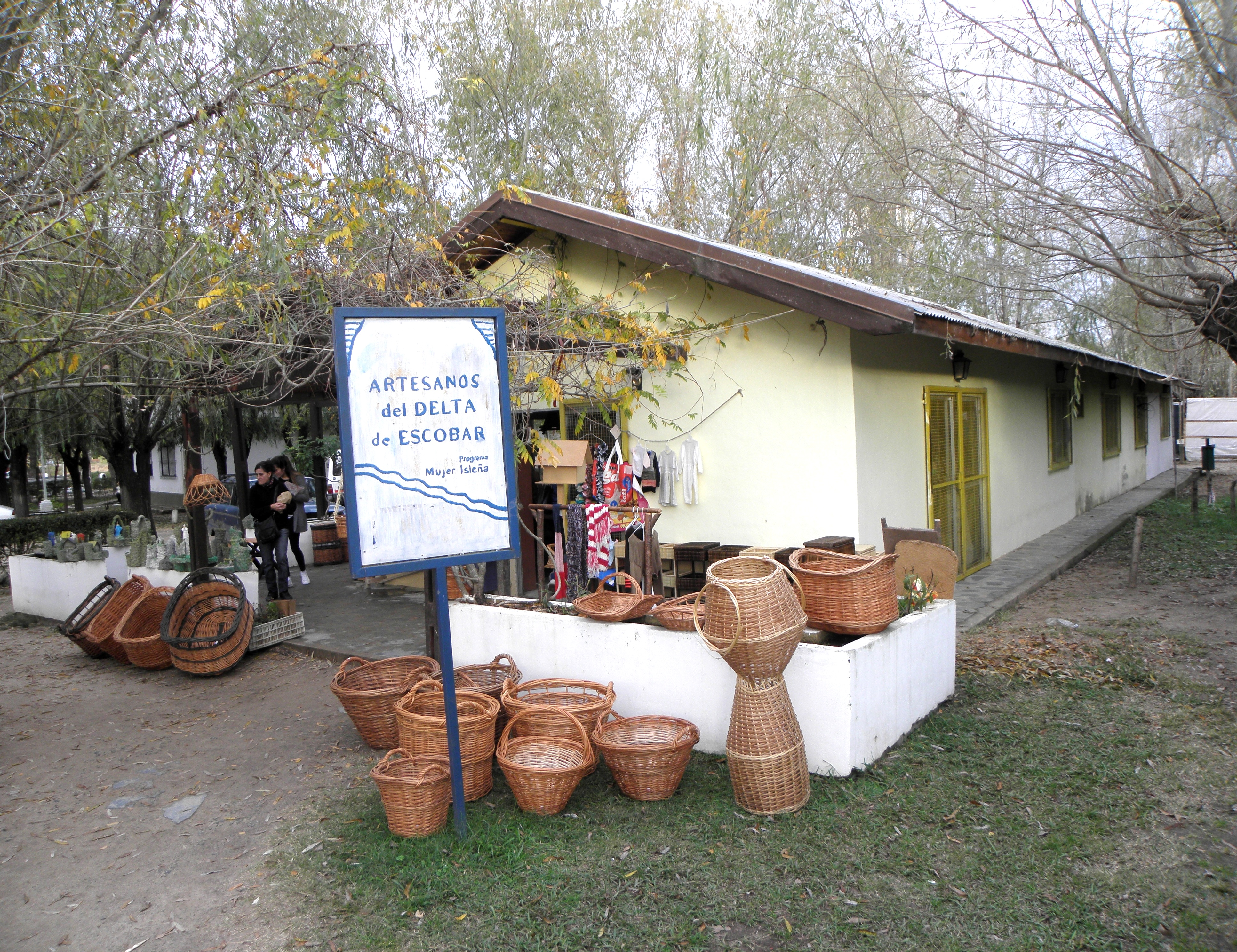 Comercios de artesanías de Puerto Paraná, en pleno delta del Paraná, sobre la ribera del río Paraná de las Palmas, partido de Escobar, en la zona nordeste de la provincia de Buenos Aires, centro-este de la Argentina.